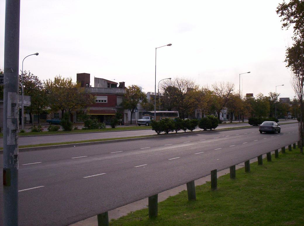 AV parque. Avenida principal del barrio Saavedra. Argentina, Ciudad de Buenos Aires.